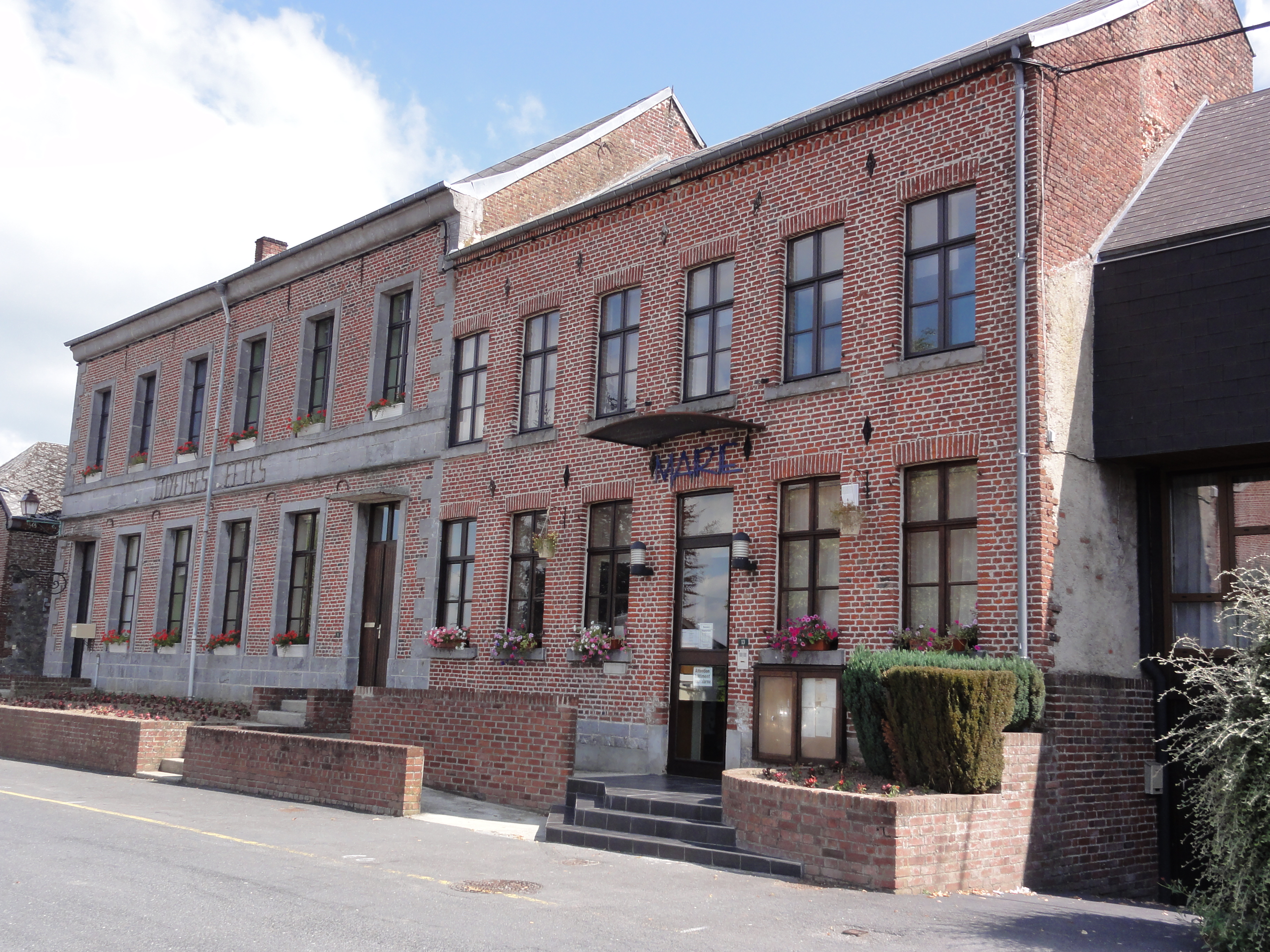 Prisches (Nord, Fr) mairie